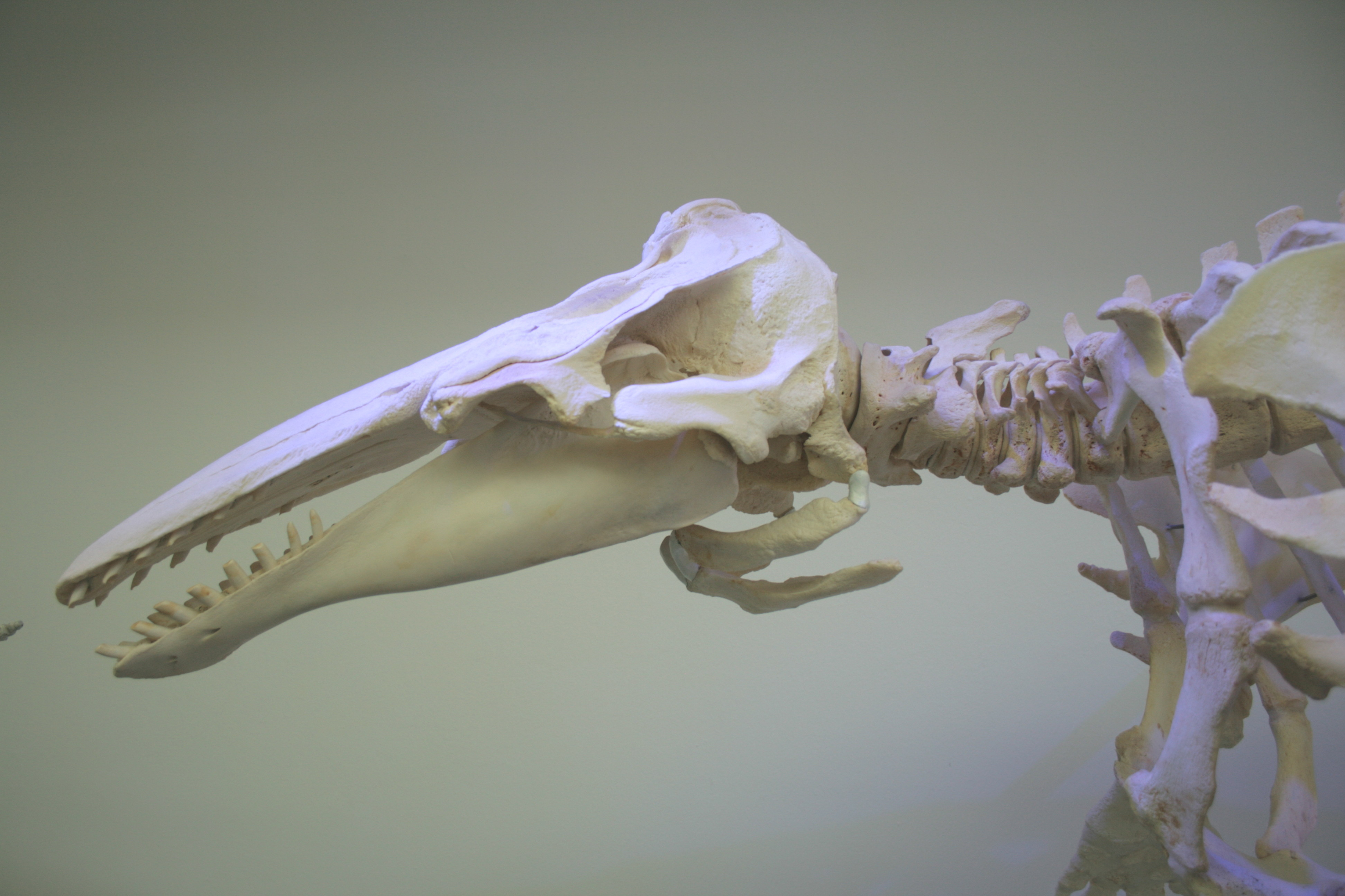 Skelett eines Beluga imZoologischen Museum Kiel - Kopf und (bewegliche) Halswirbel